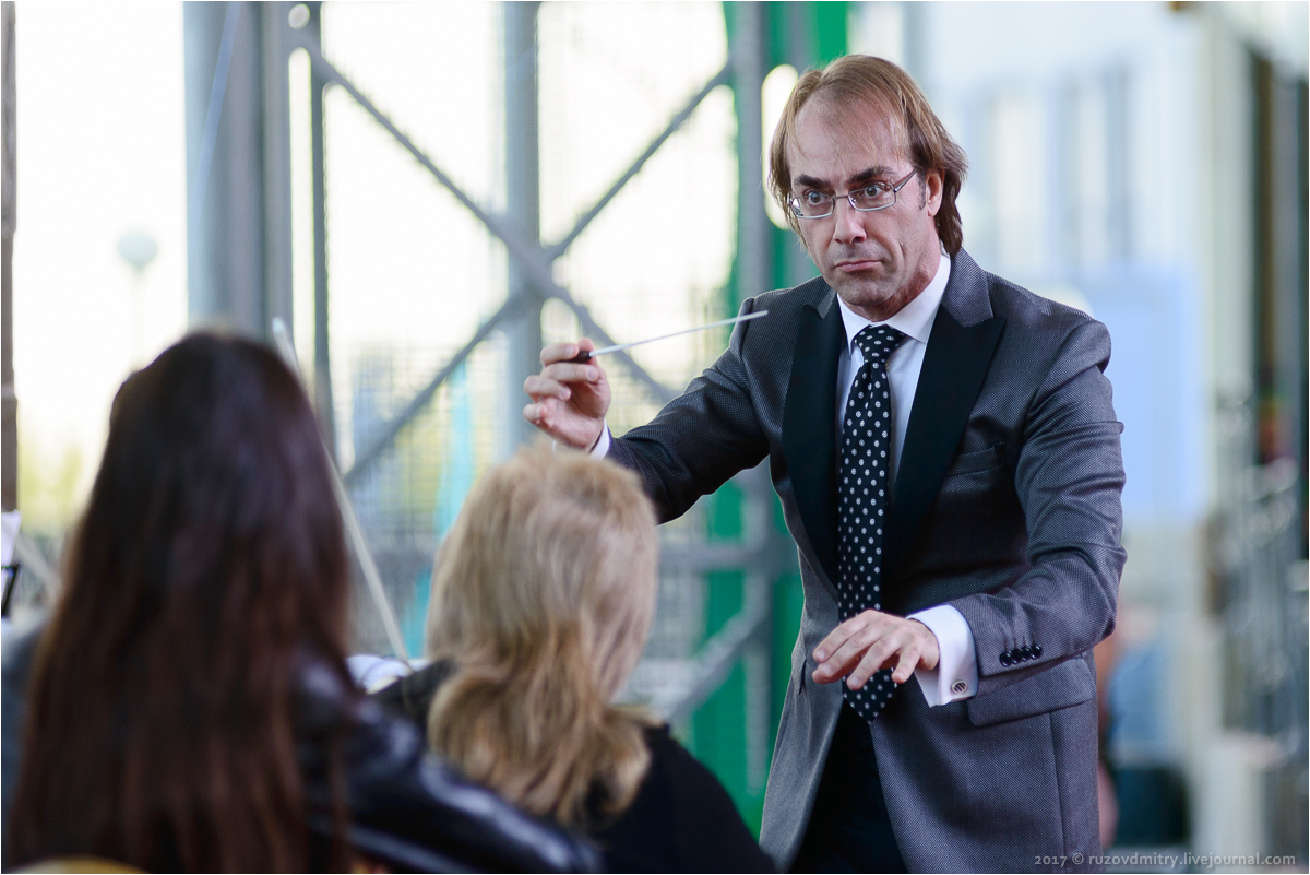 Дирижёр Фабио Мастранджело на десятом фестивале музыки и искусств "Тремоло", Тольятти, 2017 год